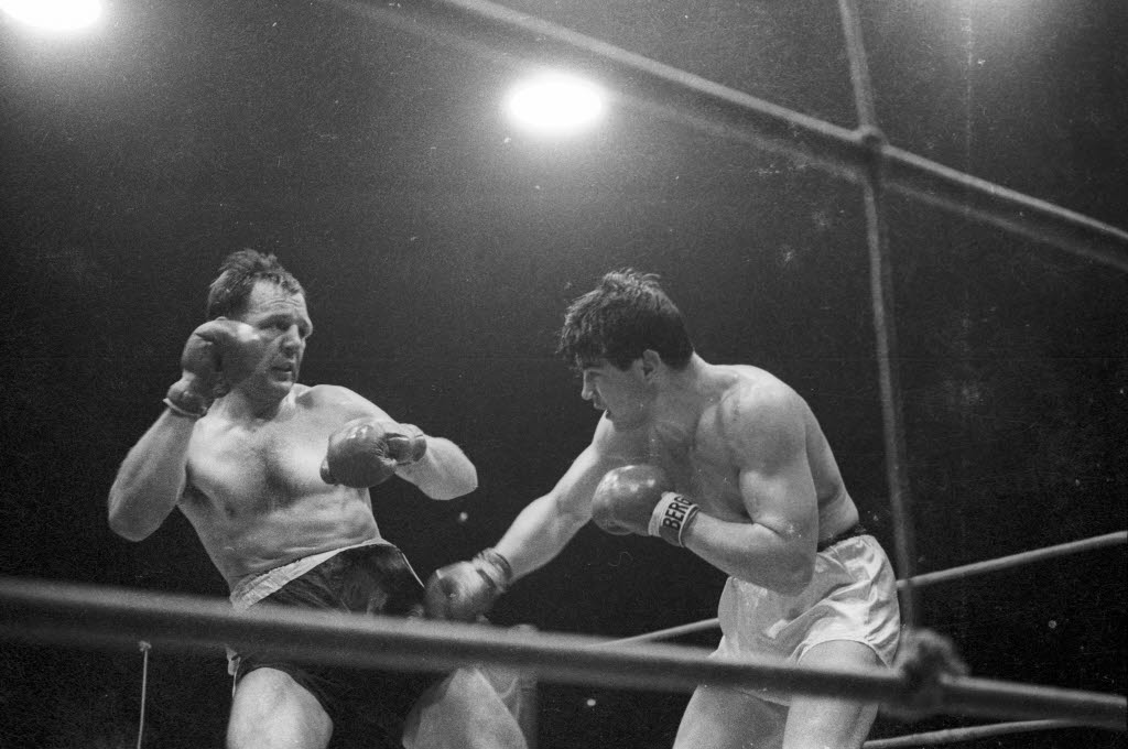 in der Ostseehalle. Der Boxer Karl Mildenberger (rechts) besiegt Ulli Ritter (links) nach Punkten.